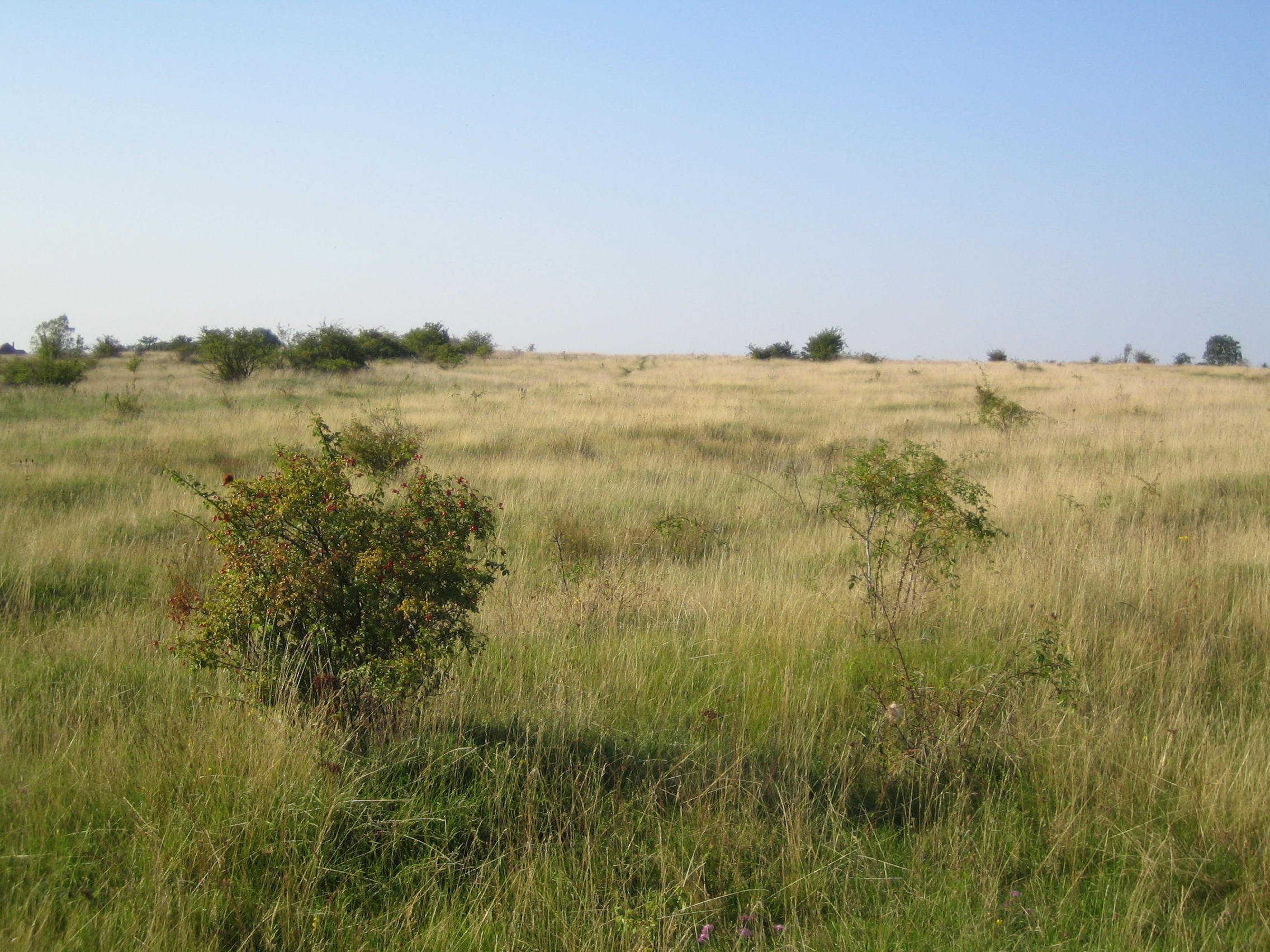 Naturschutzgebiet „Windknollen“ in Jena – Ein Bild des ehemaligen Schlachtfeldes der Schlacht 1806 der Preußen gegen Napoleon. Das Schlachtfeld hat sein Aussehen von damals behalten, da es als Truppenübungsplatz der Wehrmacht und noch längere Zeit als Panzerübungsplatz der Sowjets genutzt wurde. Somit wurde die Wiederbewaldung verhindert. Es befindet sich auf einem Bergplateau und wird durch Schafbeweidung baumfrei gehalten.